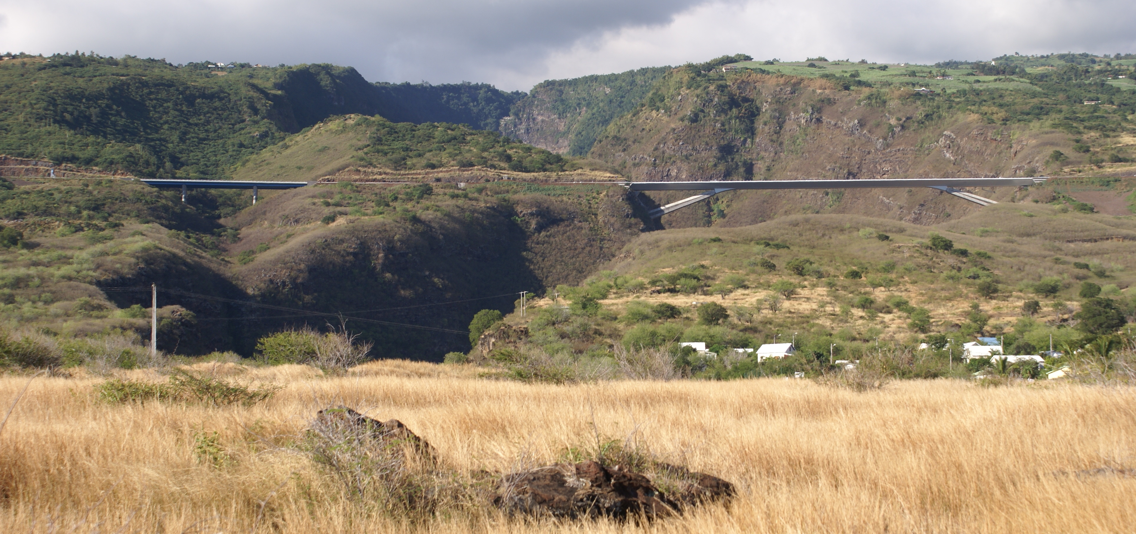 Route des Tamarins : viaduc de la Grande Ravine